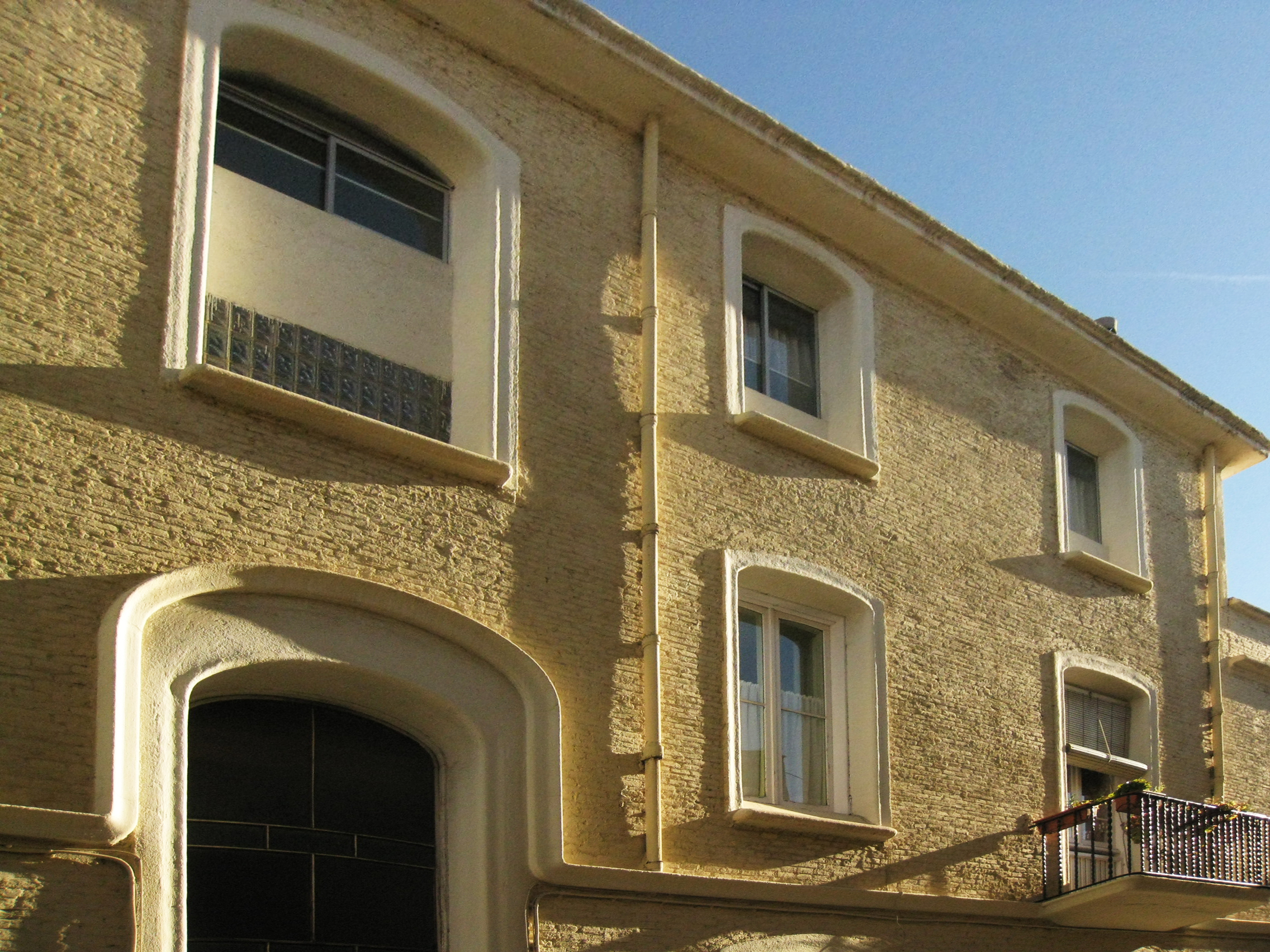 Casa Antoni Pous, obra de Lluís Muncunill de 1907, al carrer Nou de Sant Pere, cantonada amb el carrer del Passeig (Terrassa). Detall de la façana del carrer del Passeig.